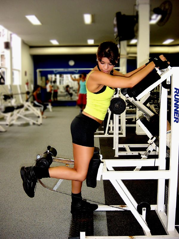 A modelo e apresentadora de TV brasileira Amanda Françozo.